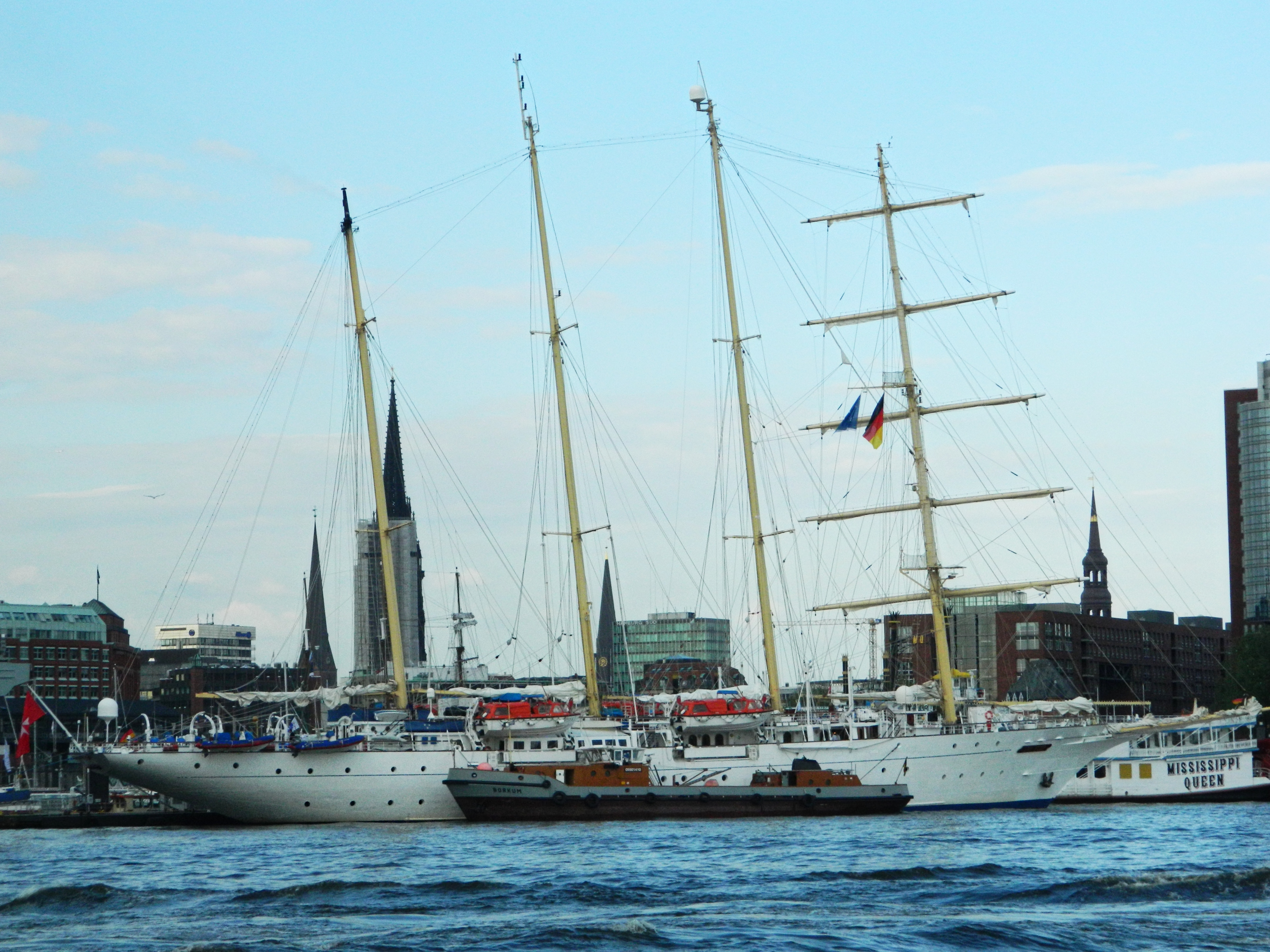 Steinwerder, Hamburg, Germany